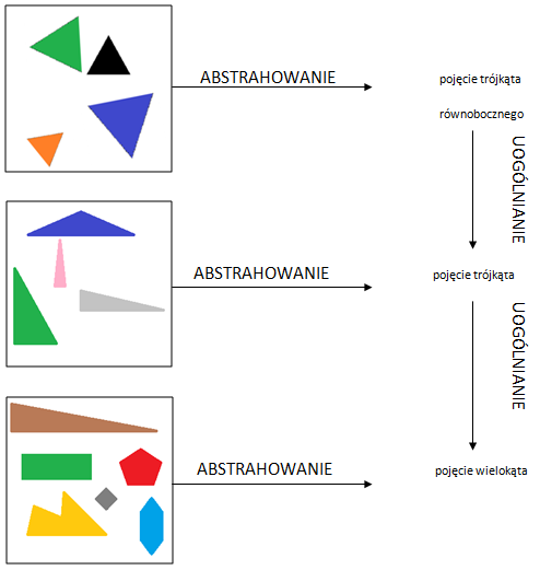 Opracowane na postawie: Puchalska, Semadeni, Nauczanie początkowe matematyki w świetle ogólnych zasad nauczania, Warszawa 1991